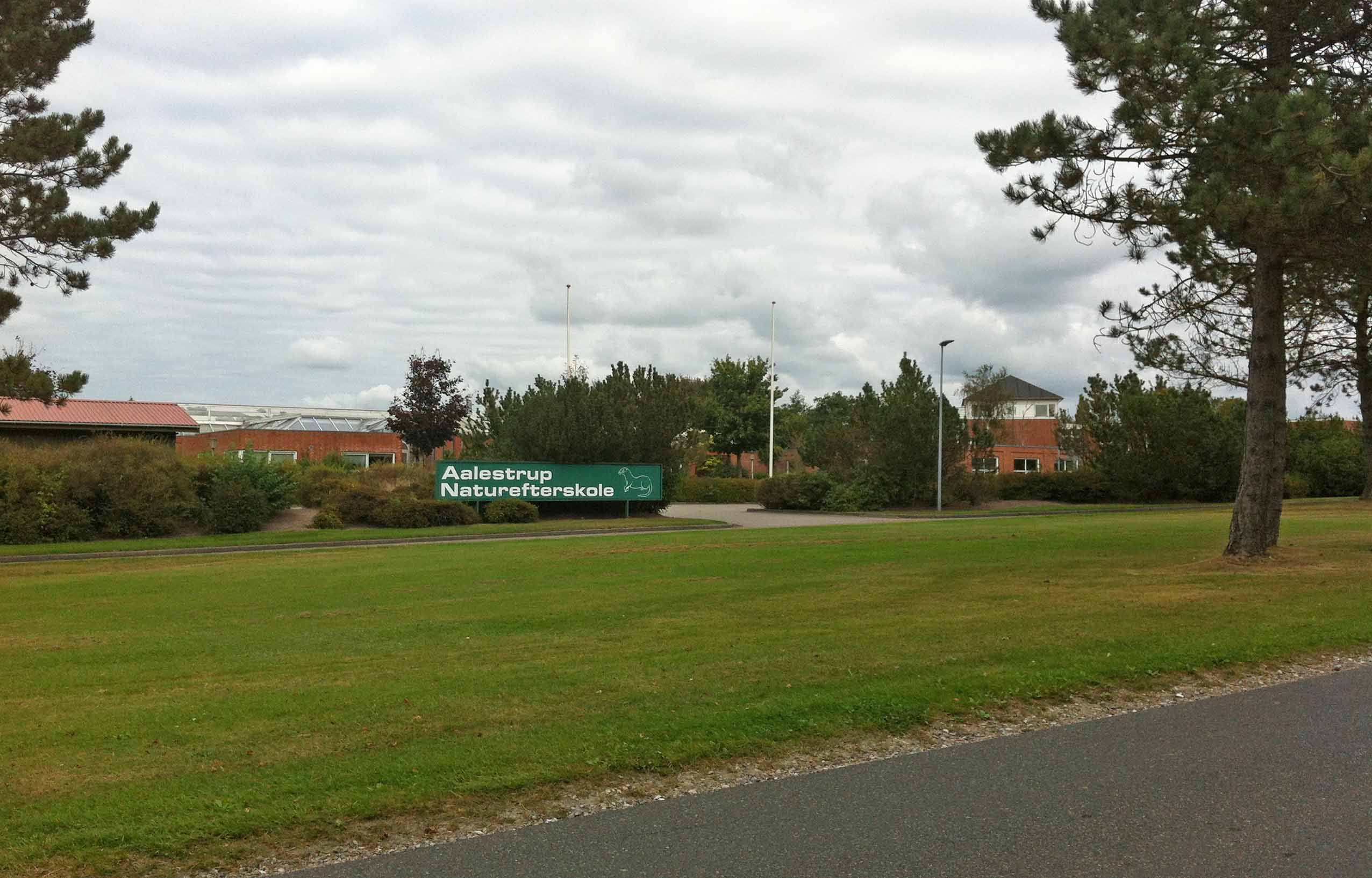 Aalestrup Naturefterskole